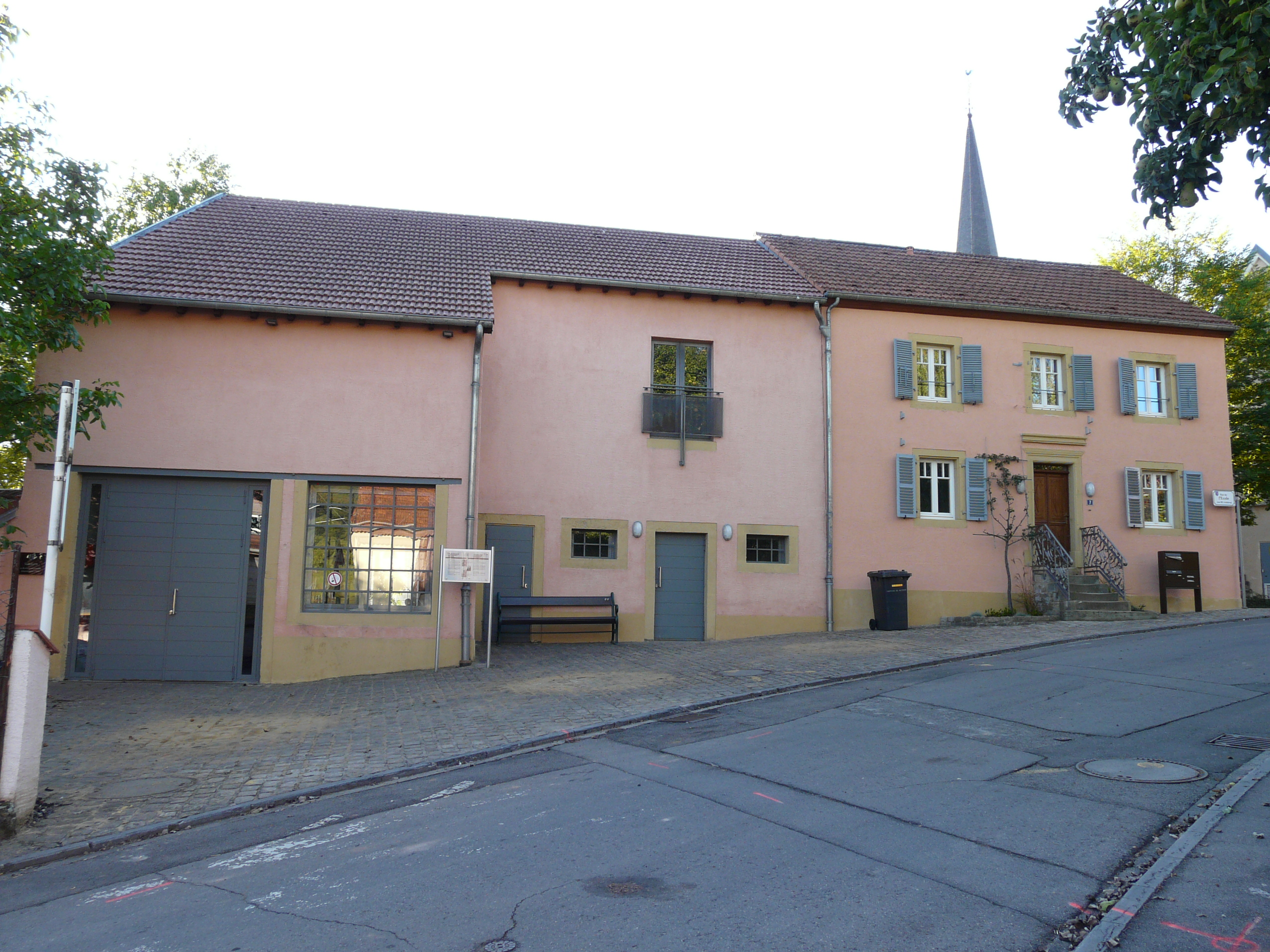 L’immeuble dit «Al Schmëtt», ou «la forge». La maison d'habitation du forgeron Léon Hoffmann et, plus tard, de son fils Victor remonte au 19e siècle. L'extension de la forge date des années 20. La forge et la maison ont été restaurées et servent comme centre culturel depuis 1999.